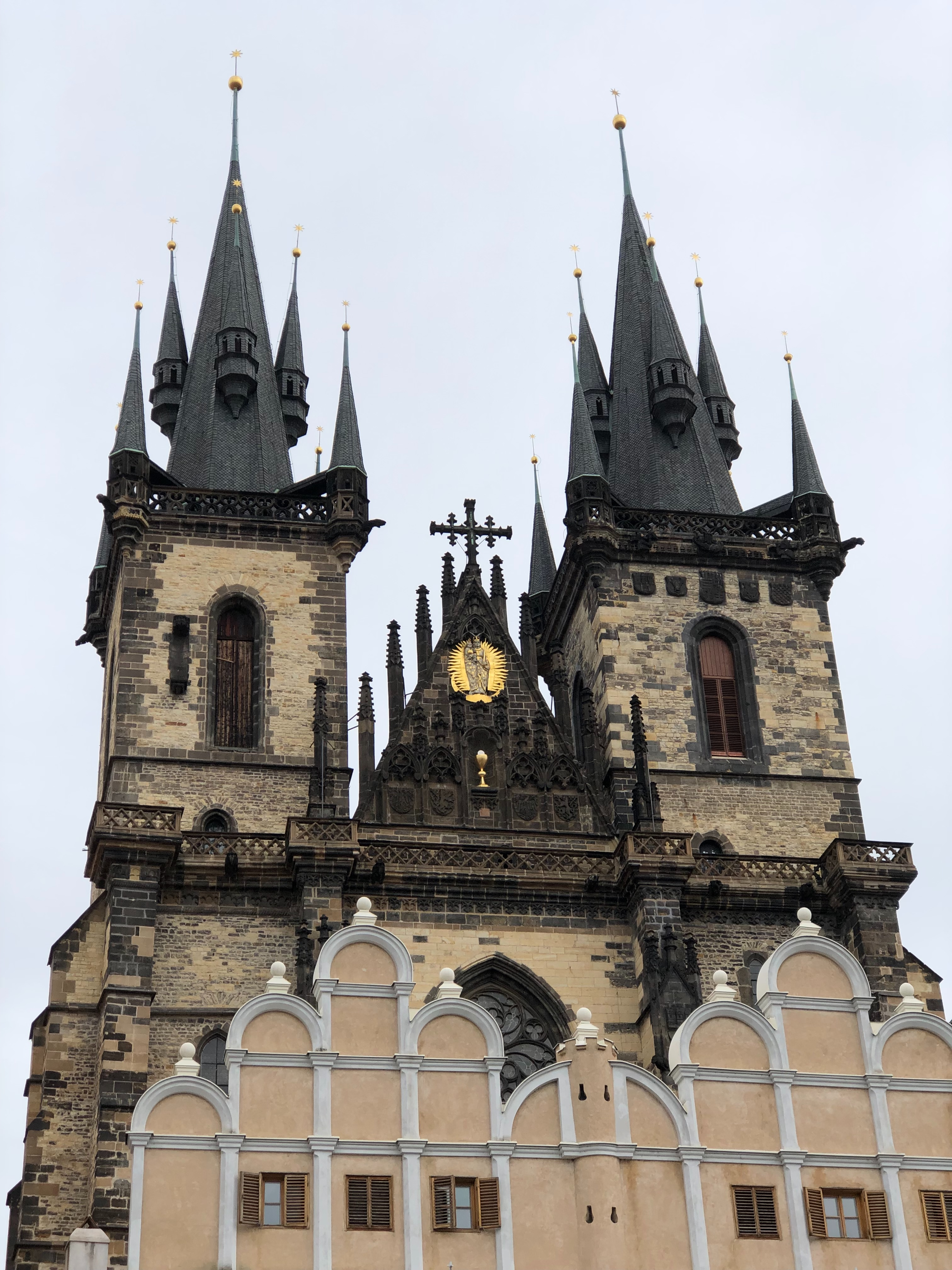 Old Town Square, Praag, Tsjechië, August 2019